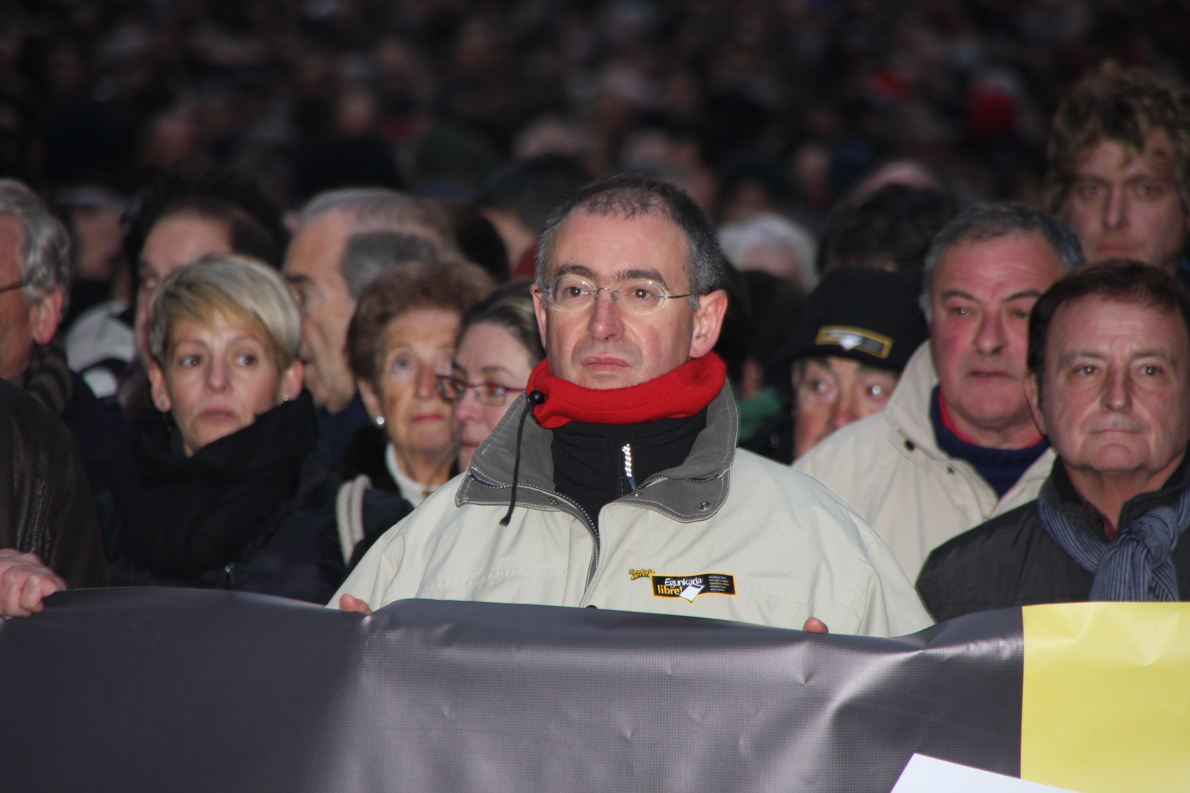 Iñaki Uria 2009an.